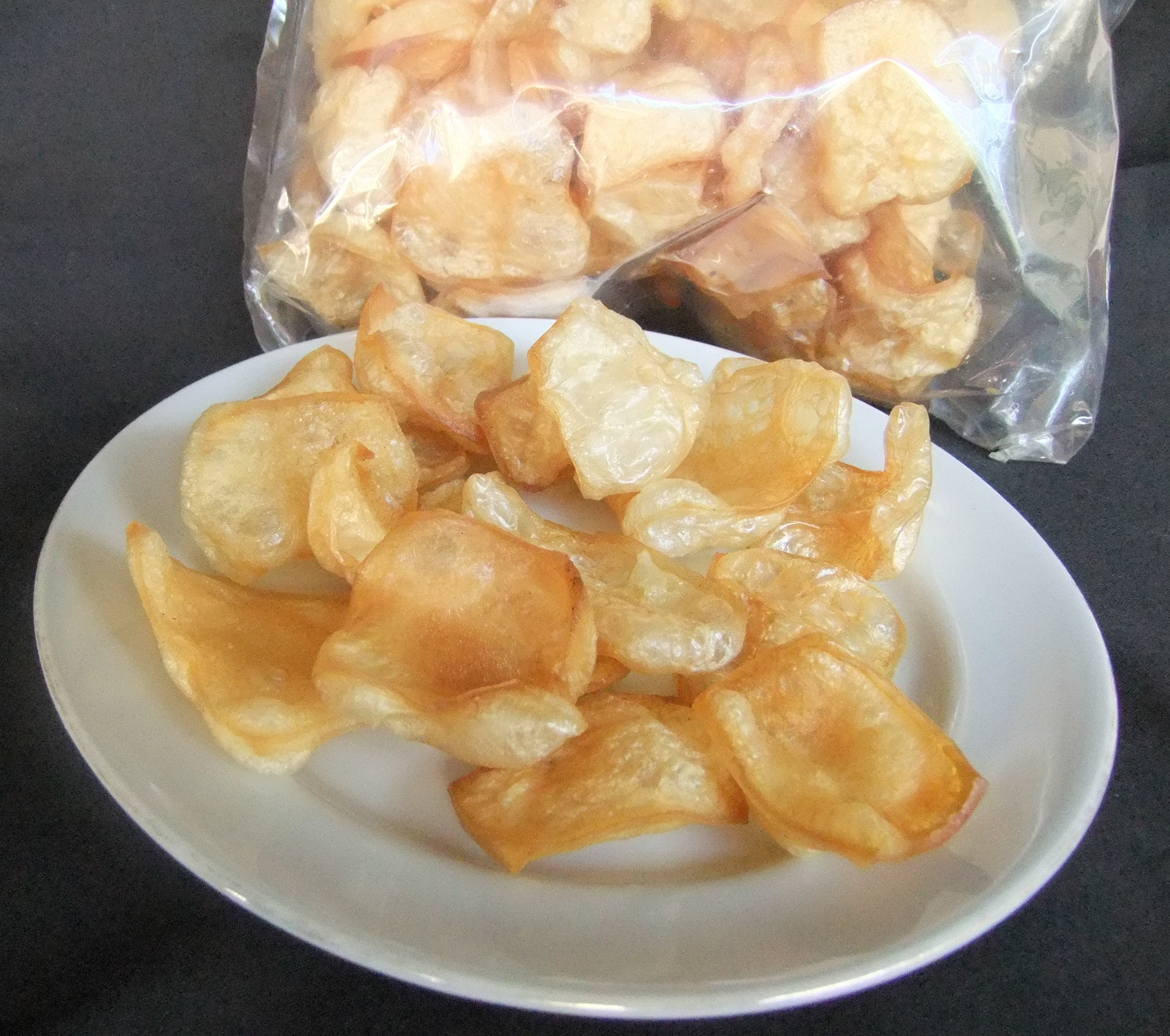 Kerupuk kulit (kerupuk jangek) sudah digoreng sekali.